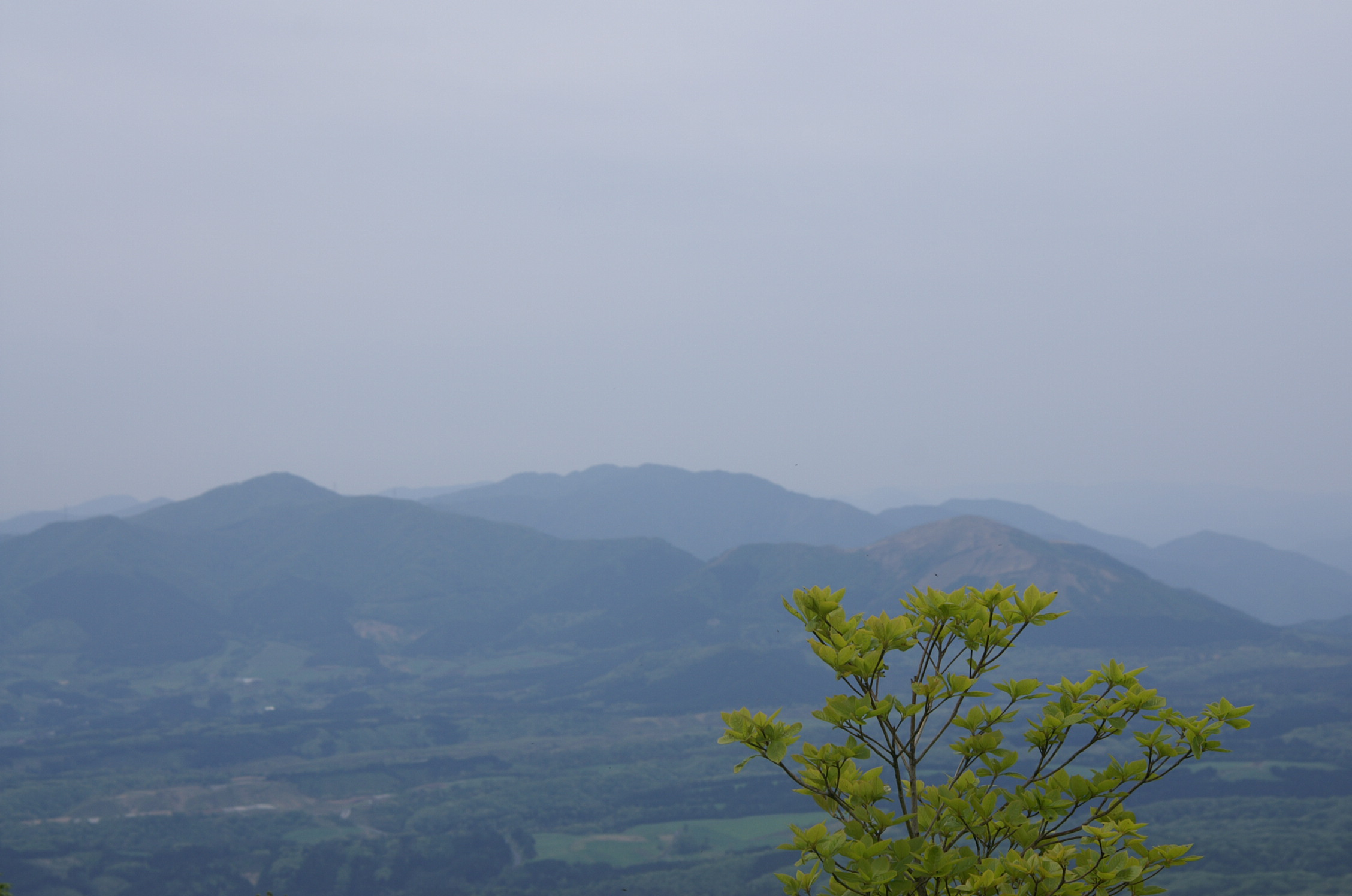 皆ヶ山から見た毛無山